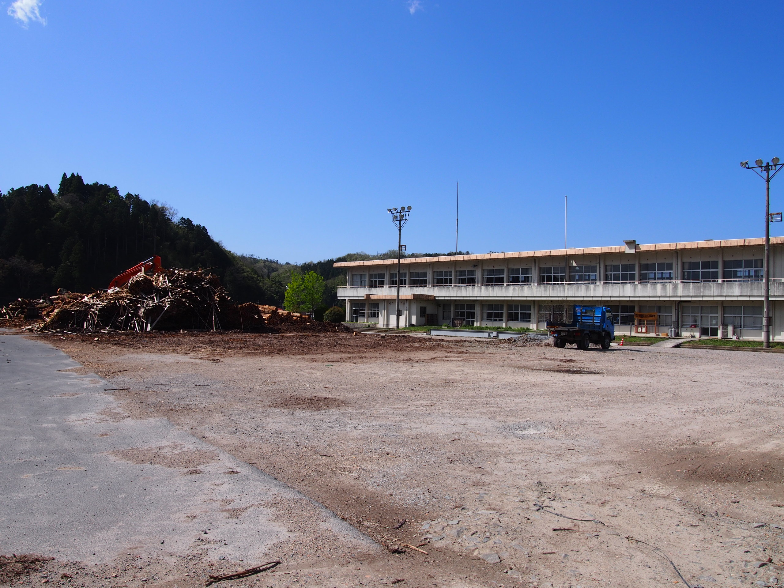 京丹後市立大宮第三小学校(京都府京丹後市大宮町森本)